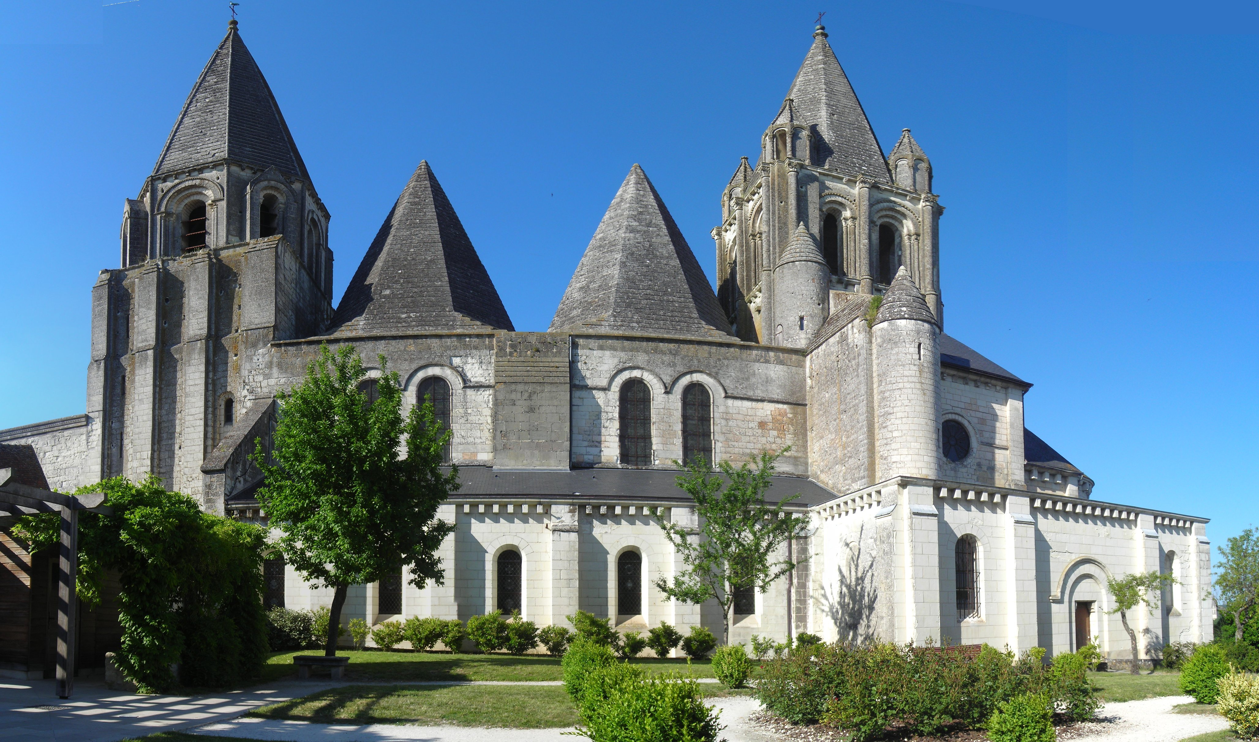 Panorama de la collégiale Saint-Ours de Loches, vue du jardin du jardin Saint-Louis